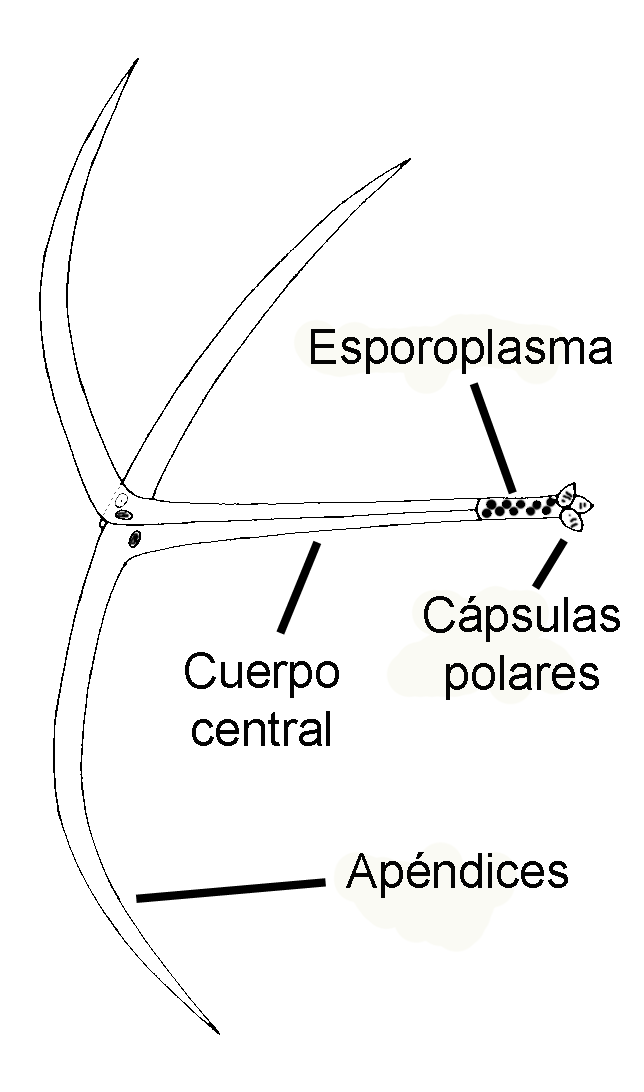 Un Myxobolus cerebralis en estadio actinomyxon. procedente de Image:Actinomyxon.jpg de John Owens (talk).